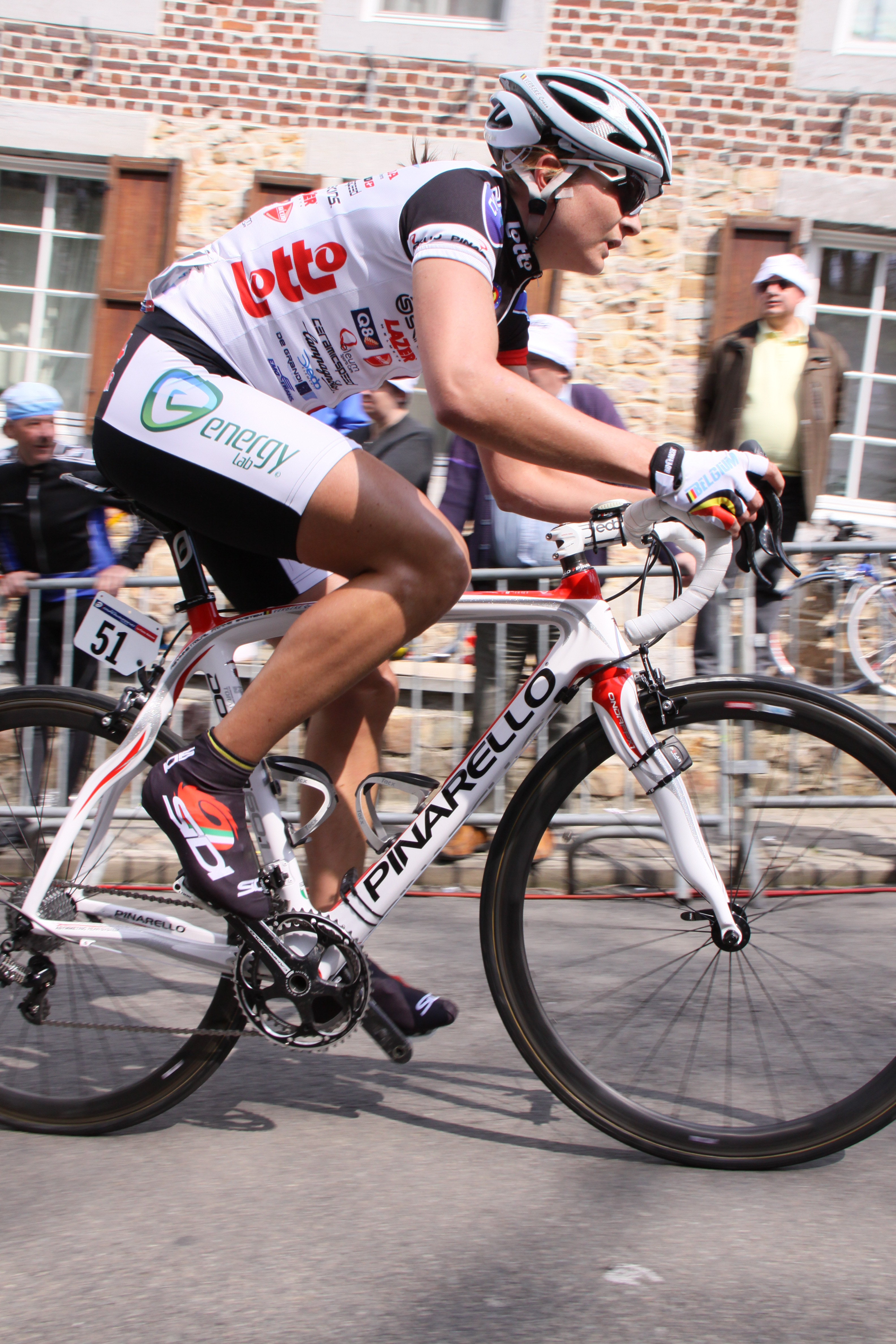 Grace Verbeke. Beklimming van de Muur van Hoei tijdens de Waalse Pijl 2010.